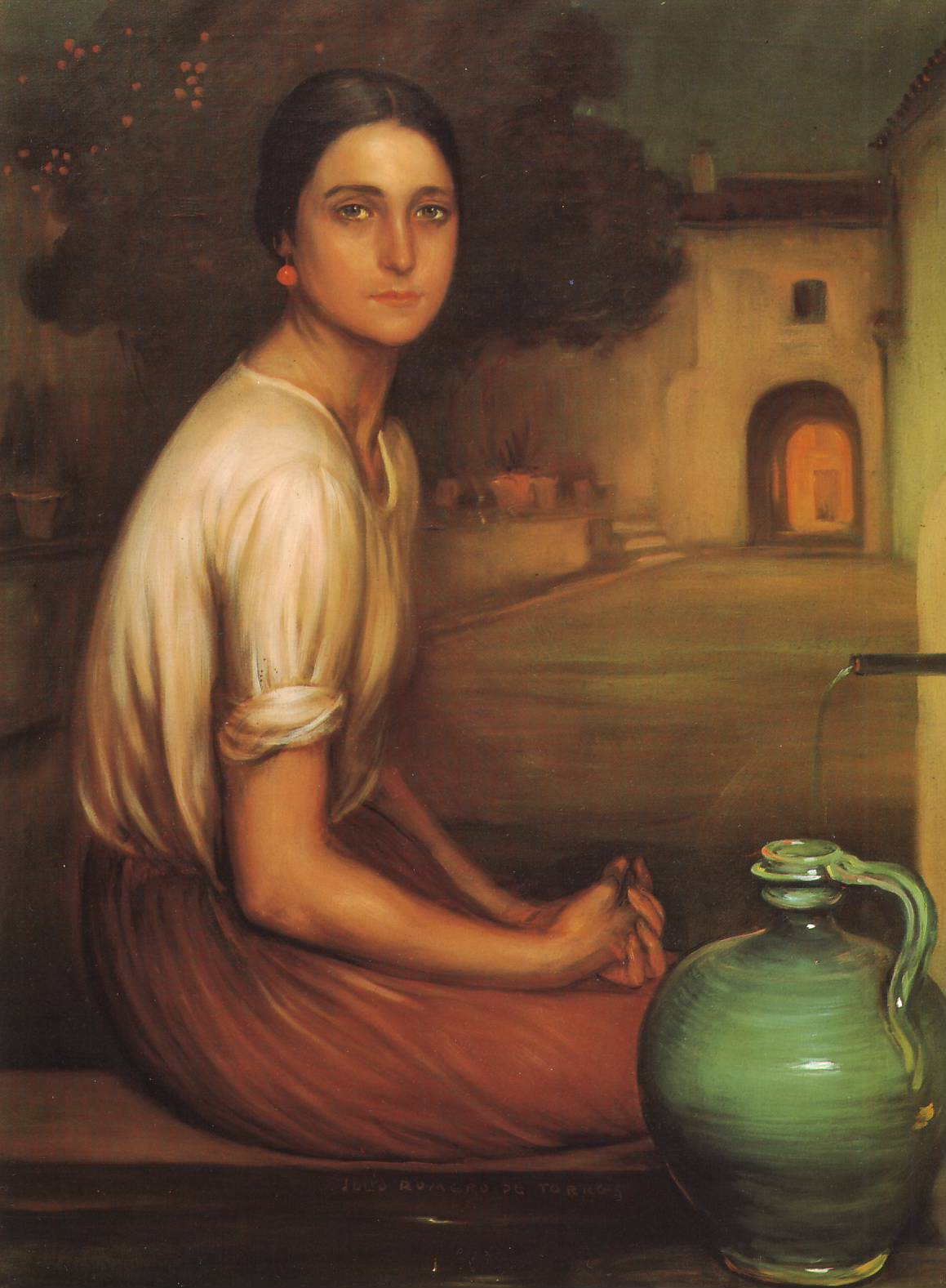 La niña del cántaro, pintado por Julio Romero de Torres en 1927. Hace más de 80 años de la muerte del autor.